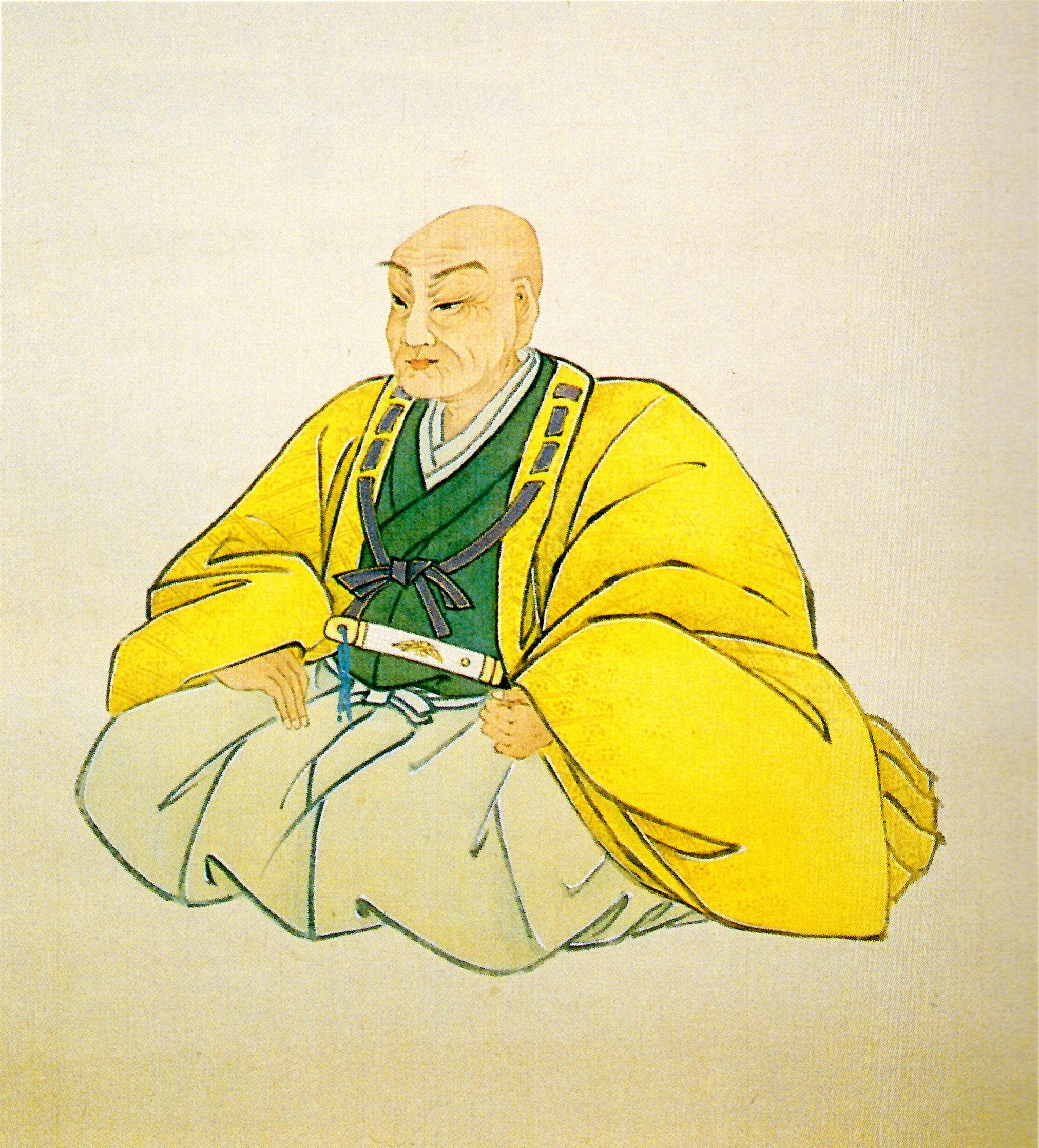 金森宗和の肖像。